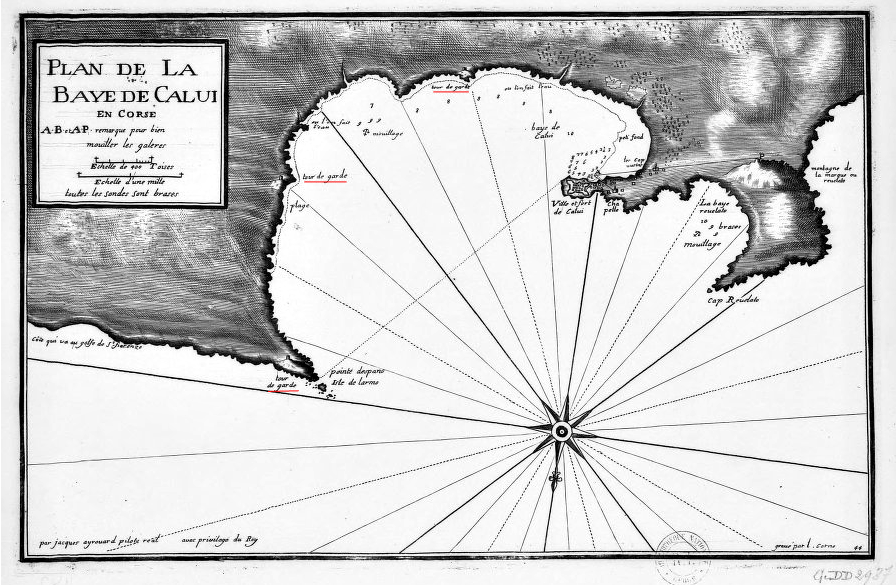 Calvi, Balagne (Corse) - Plan de la baye de Calvi par Jacques Ayrouard 1700-1799